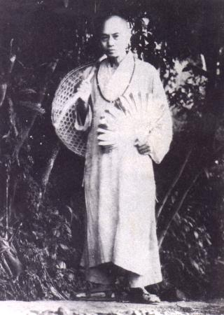 bhikkhu(kuangchin)